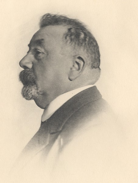 Louis Gauchat (1866-1942) est un linguiste neuchâtelois, et l'initiateur du Glossaire des patois de la Suisse romande.